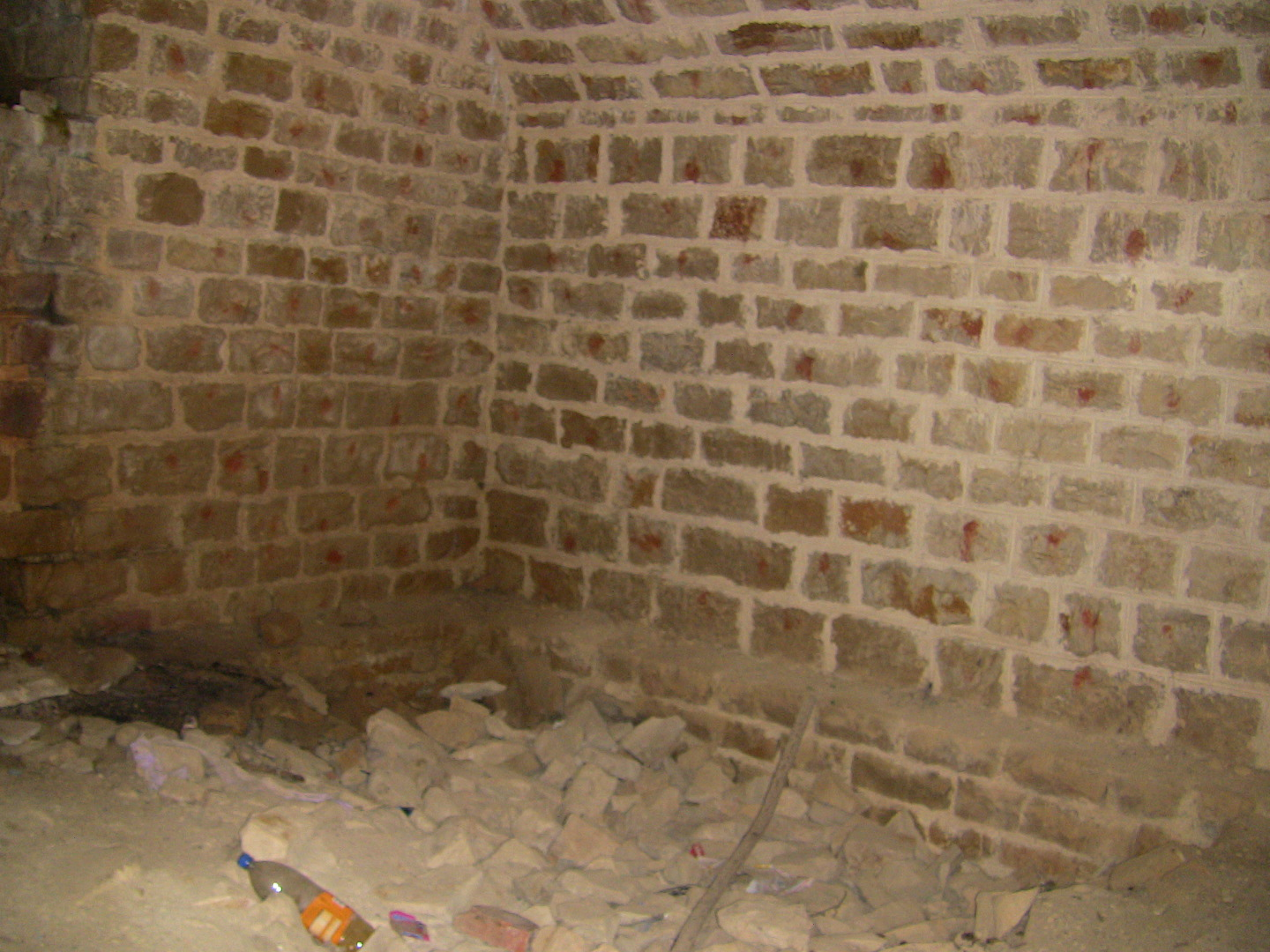 Une pièce de la caserne sud-ouest du fort de Planoise, à Besançon (Doubs, France).